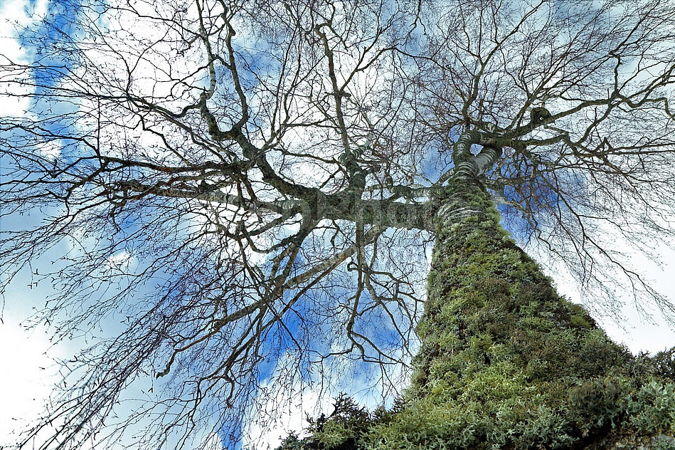 Кологривский лес: , Костромская область This image is related to the protected area of Russia number 4400001